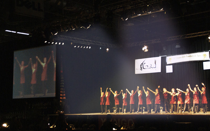 Die Formation Esperanza der TSG Blau-Silber Gernsheim auf der Europameisterschaft 2007 in Frankfurt/Main